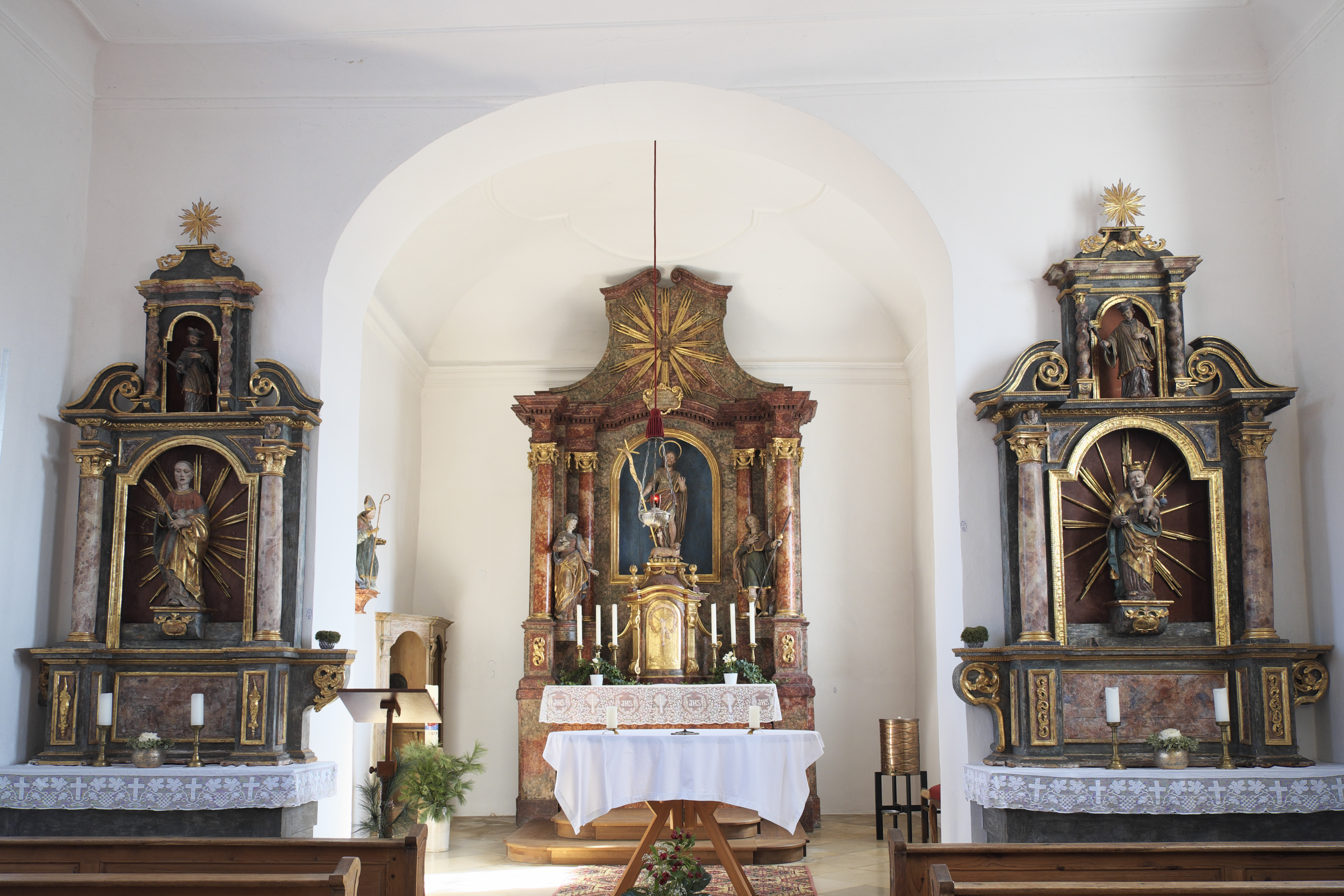 Alte katholische Pfarrkirche St. Johannes der Täufer in Breitbrunn am Ammersee (Herrsching am Ammersee) im Landkreis Starnberg (Bayern/Deutschland), Innenraum, Altäre